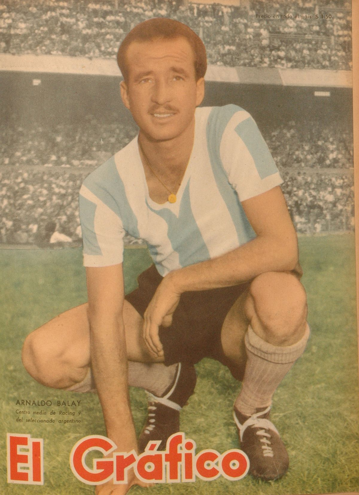 Palito Balay, con la camiseta de la Argentina.